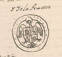 Sello de 1473 de Isabel de Castilla como princesa de Asturias. Dibujo de Luis de Salazar y Castro "Seguro que la Reina Católica, siendo Princesa, dio al conde de Haro", Salamanca, 15 de mayo de 1473, Real Academia de la Historia, colección Salazar, K-37, fol. 112v, apud. VV. AA., Isabel la Católica en la Real Academia de la Historia, Real Academia de la Historia, 2004. ISBN 978-84-95983-54-1. Cfr. para la heráldica de Isabel y Fernando las págs. 72 y ss. Cfr. también Faustino Menéndez Pidal de Navascués, «"Tanto monta". El escudo de los Reyes Católicos», en Luis Suárez Fernández, Isabel la Católica vista desde la Academia, Real Academia de la Historia de España, (Estudios, 16), 2005, págs. 99-138. ISBN 978-84-95983-65-7